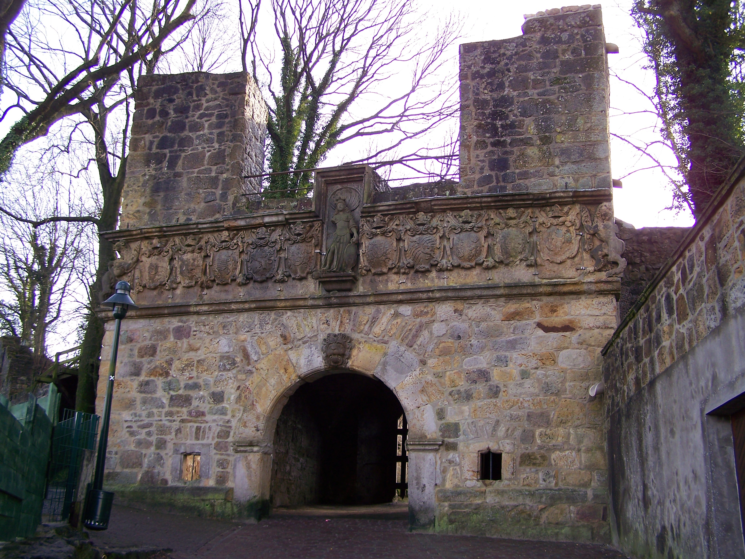 Torhaus der Burg Tecklenburg.